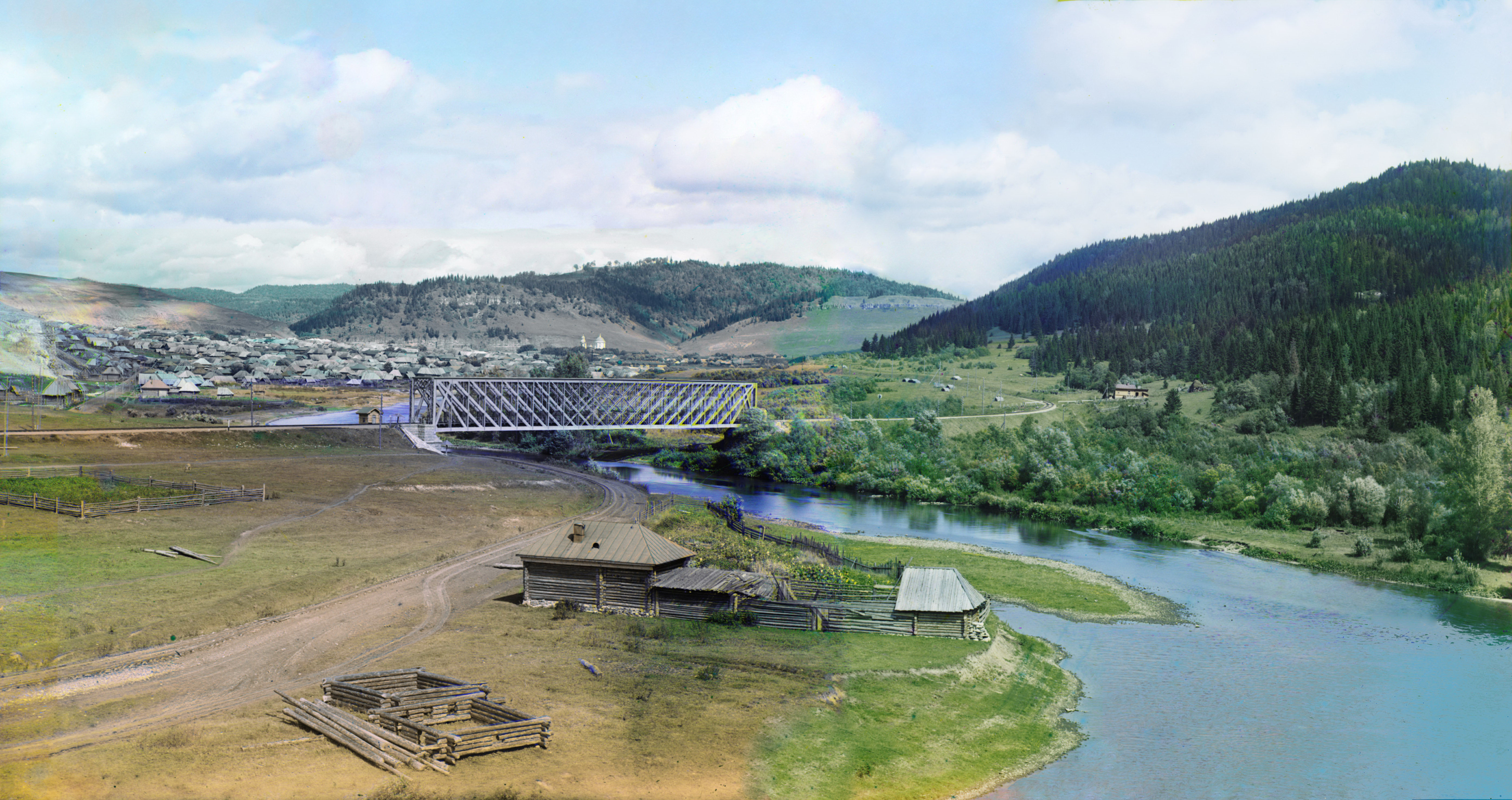 фото Миньяра 1910 год